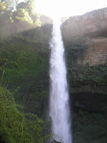 Vista al Salto Rehuén, Mulchén, Chile